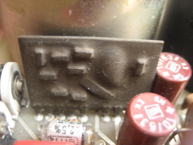 Circuito ad altissime prestazioni Ibrido nel Preamplificatore Microfonico Ant-Telefunken V672 . Prestazioni e affidabilità veramente eccezionali. Substrato ceramico, materiale conduttivo e resistivo formano la parte passiva del circuito. I resistori serigrafati tarati al laser offrono affidabilità e precisione. Sulla base ceramica sono montati i transistor discreti SMD. La taratura al laser del circuito stesso, evita l’utilizzo dei trimmer e garantisce una maggiore stabilità nel tempo del dispositivo.